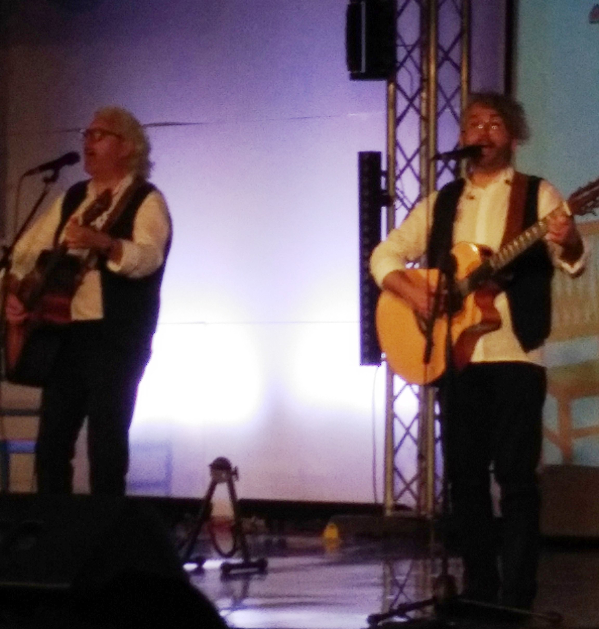 I Calandra e Calandra in concerto